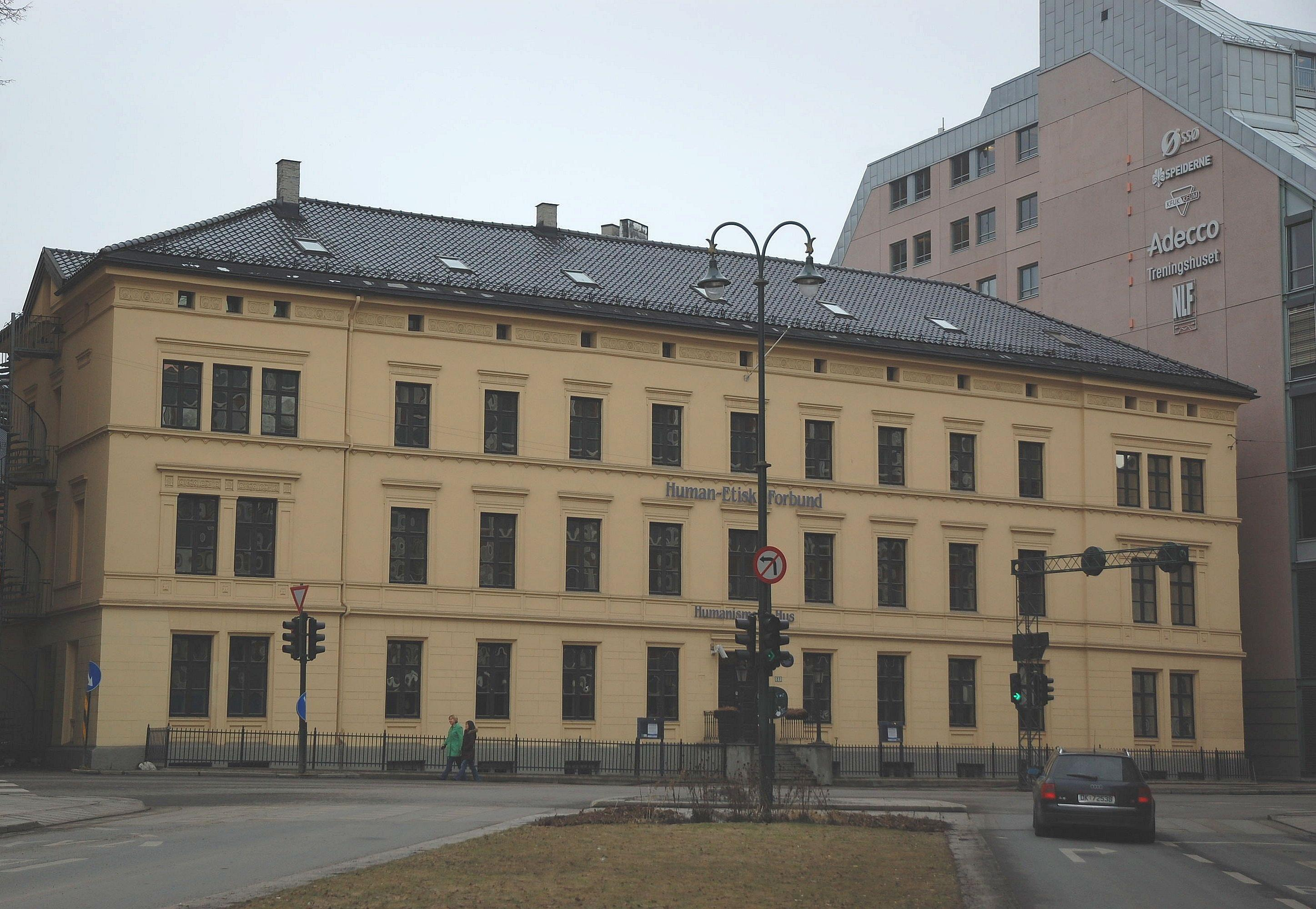 Humanismens Hus i St. Olavs gate 27 i Oslo.